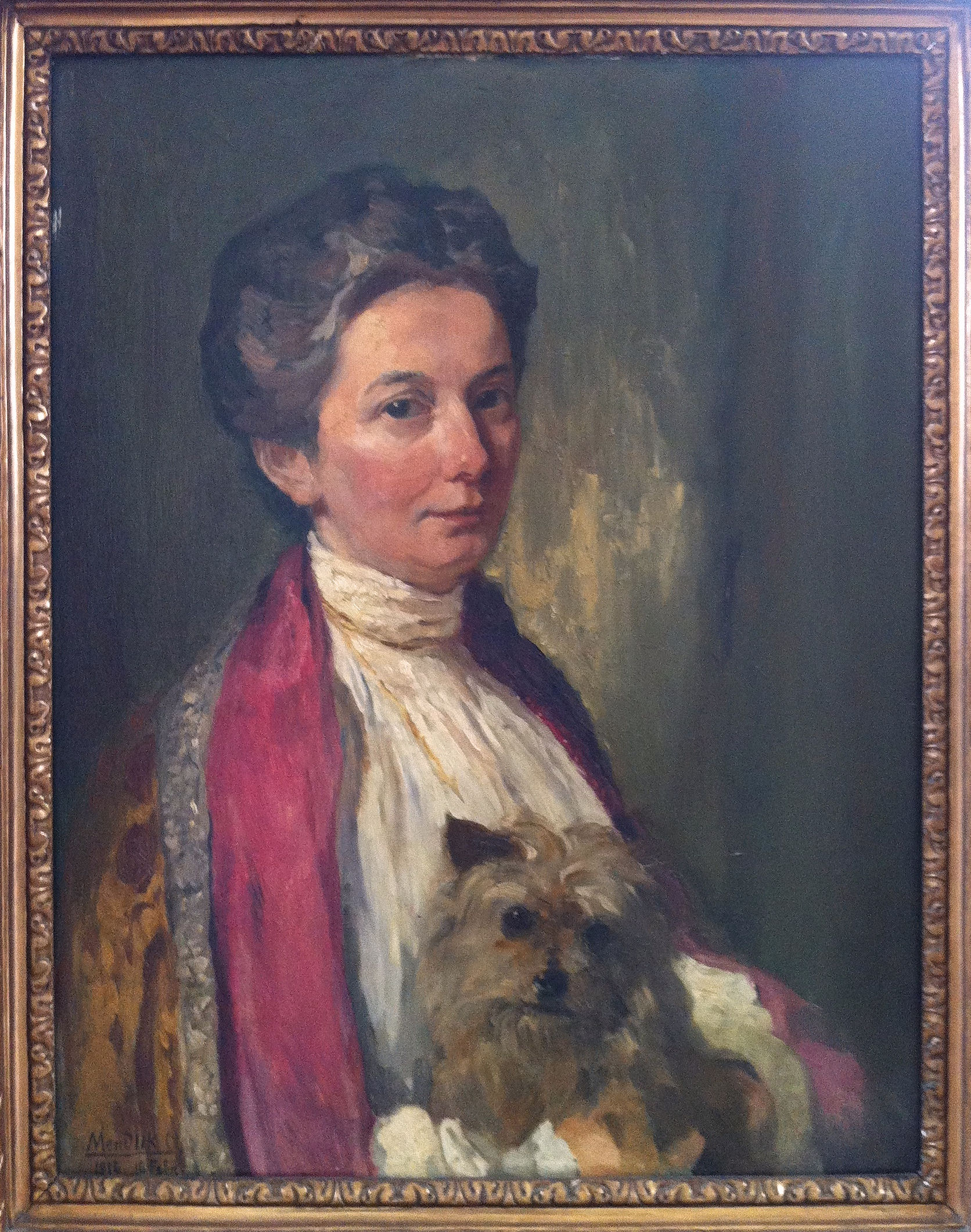 Julie Mijnssen in 1916 geportretteerd door haar echtgenoot, de Hongaarse kunstschilder Oscar Mendlik